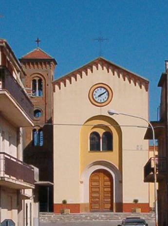 Rosario Vizzini - Granieri: la chiesa parrocchiale